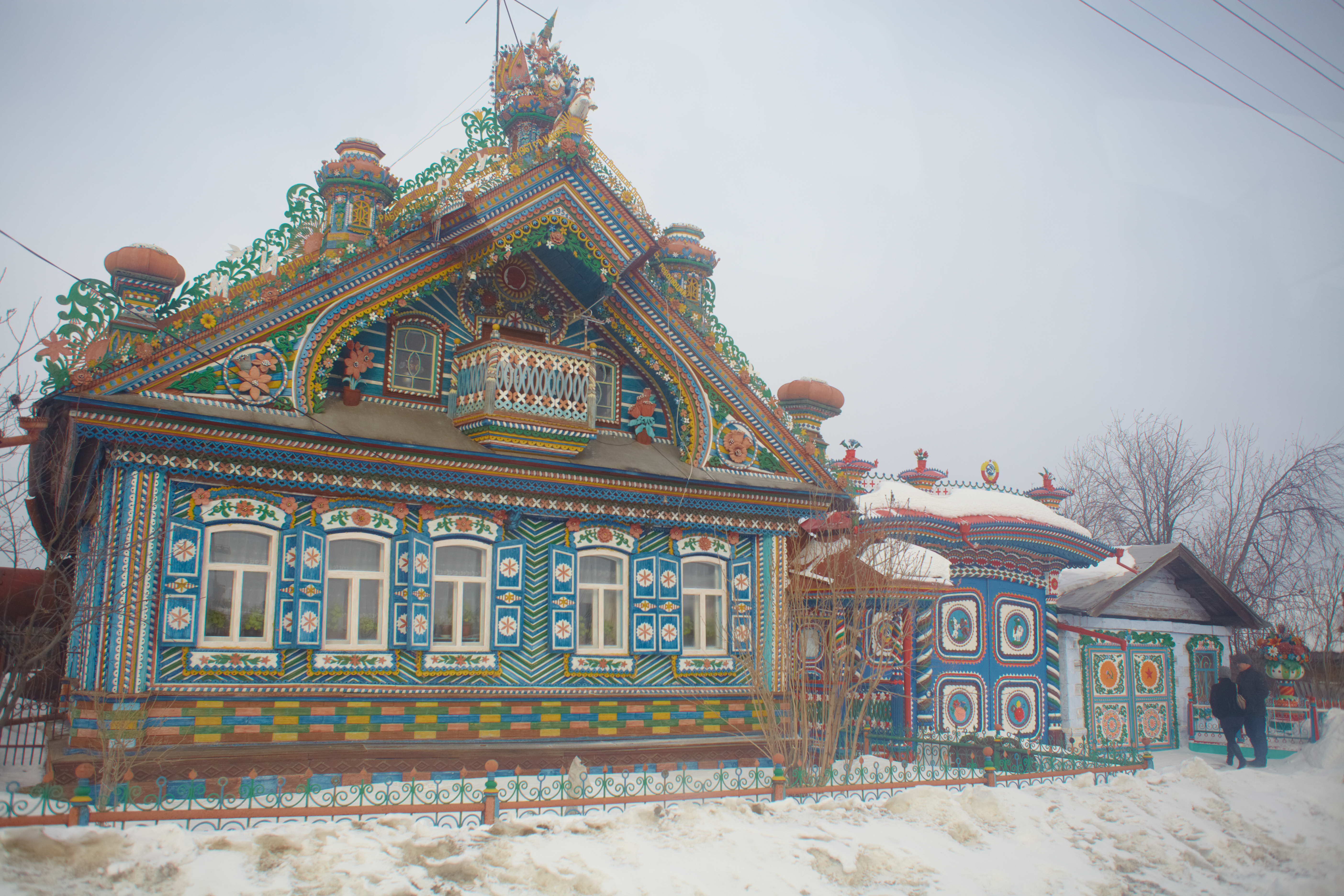 Дом кузнеца Сергея Ивановича Кириллова